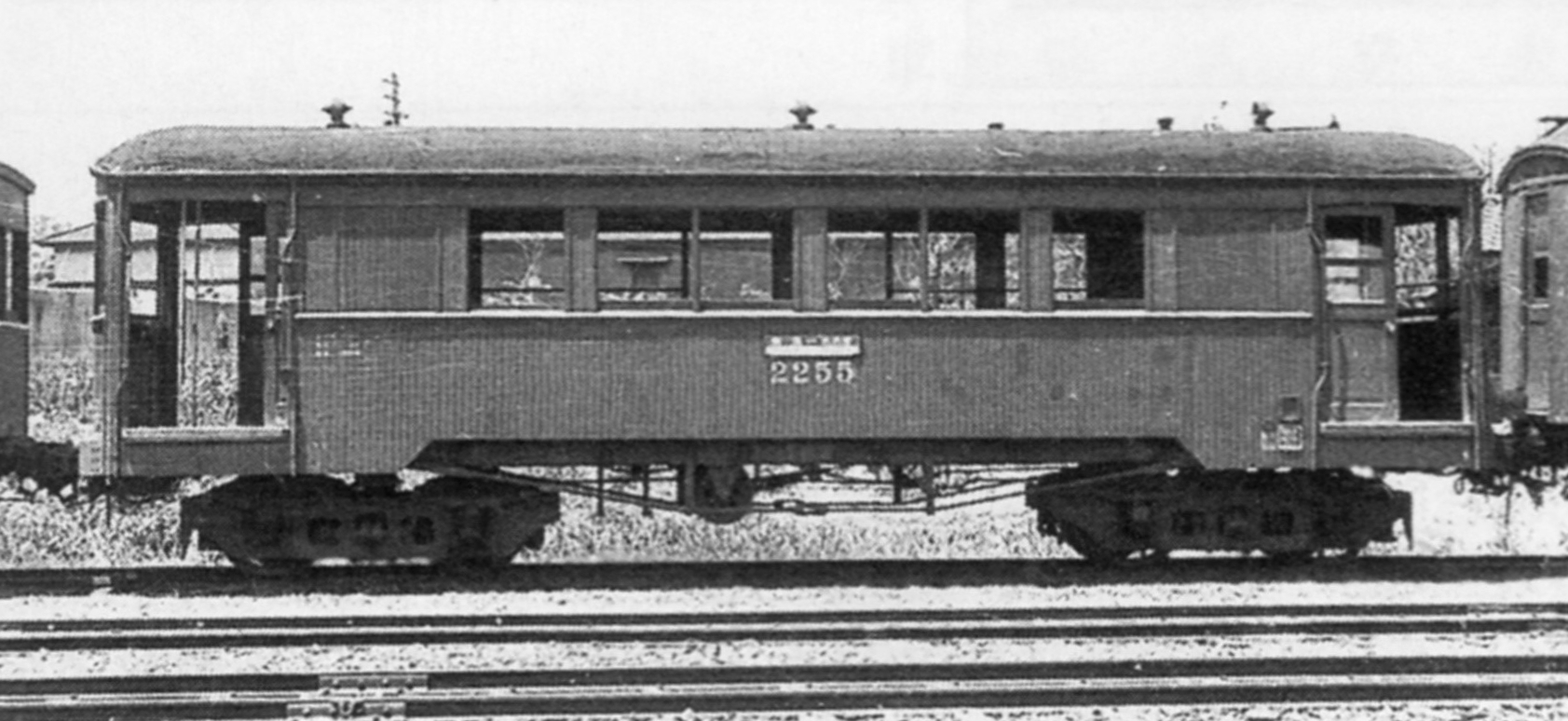 サ2255。近江鉄道クハ21形25を購入。